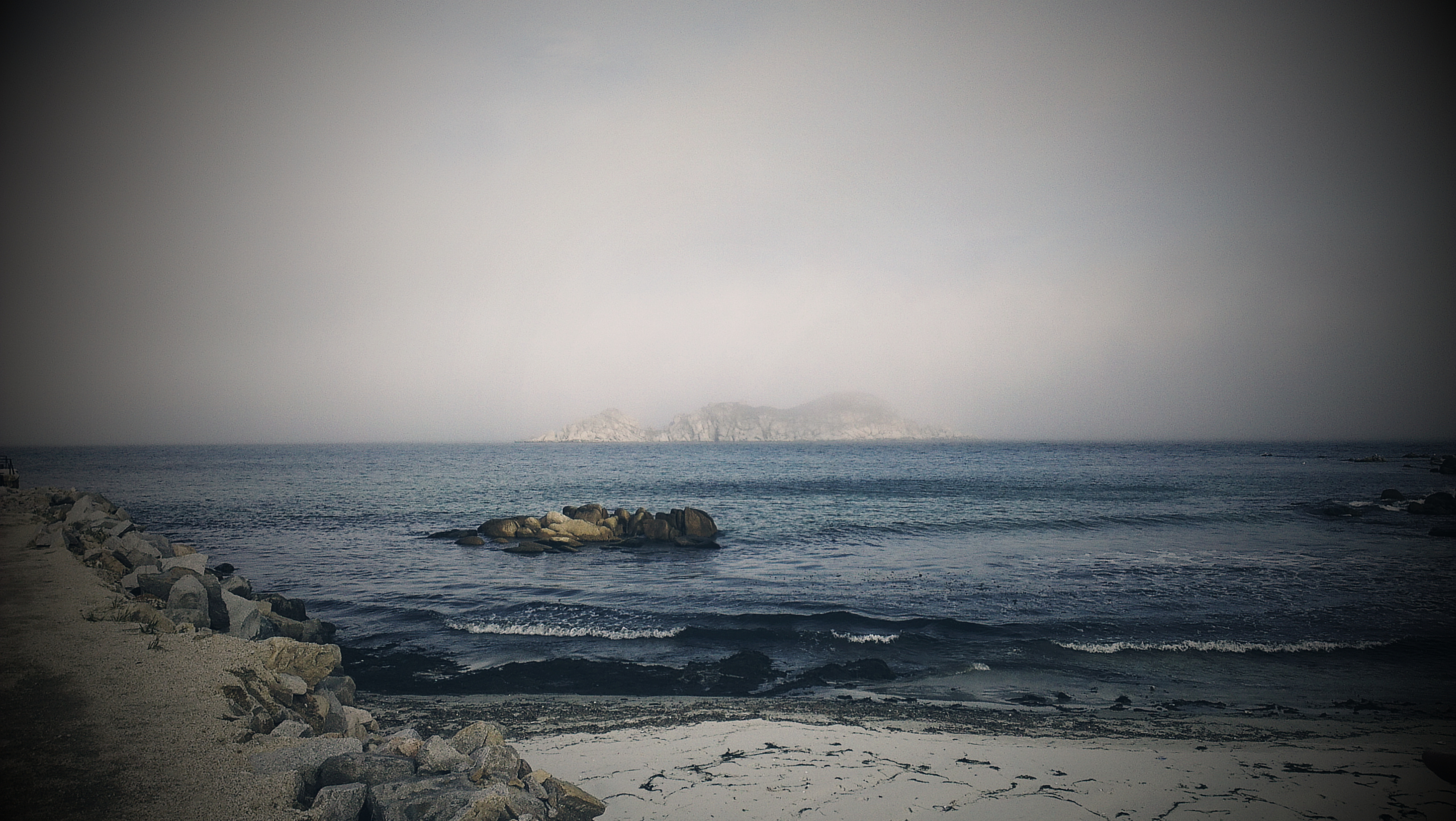 Бухта Триозерье